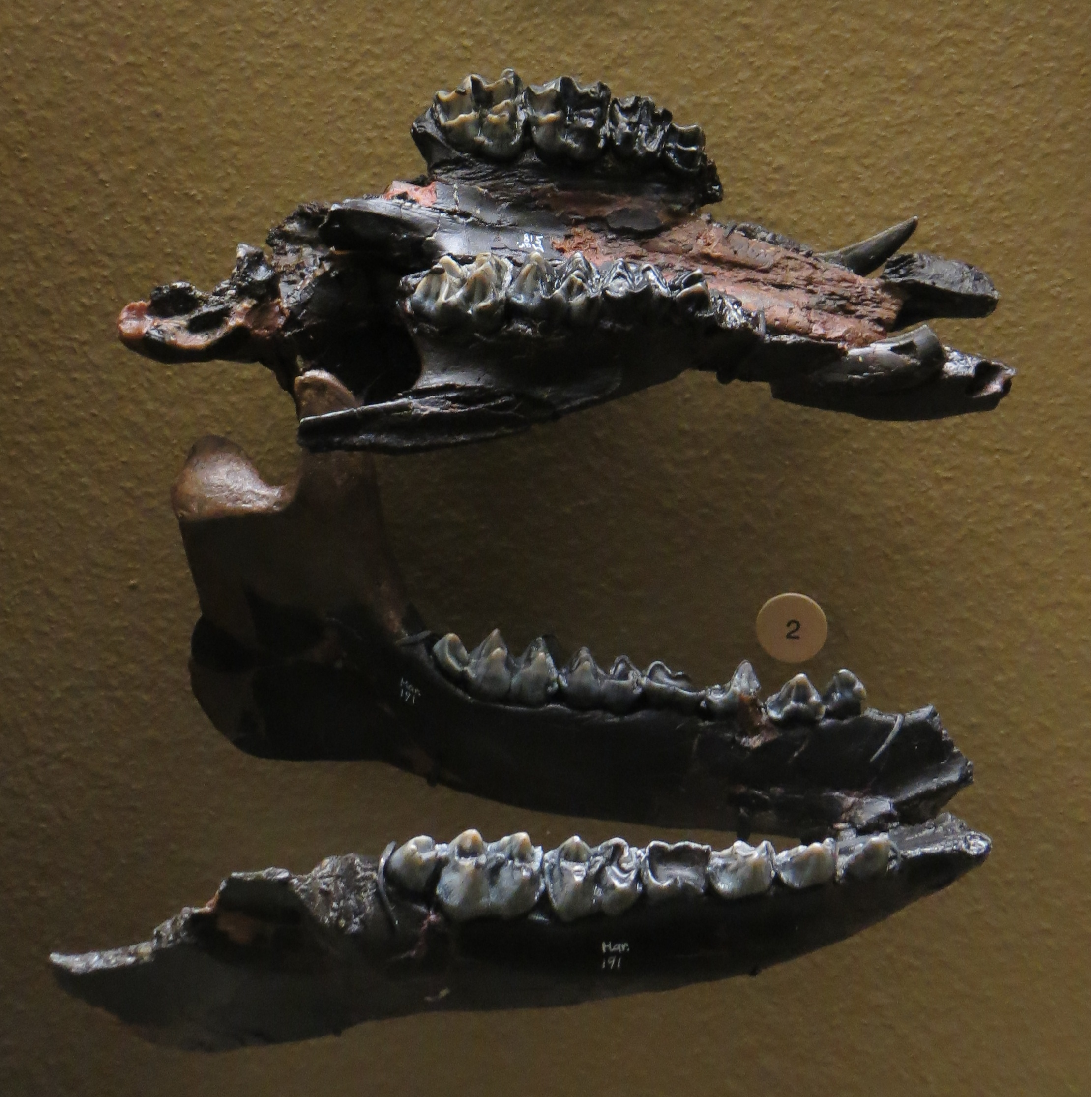 Fossil of Elomeryx - Took the picture at Natural History Museum, Basel